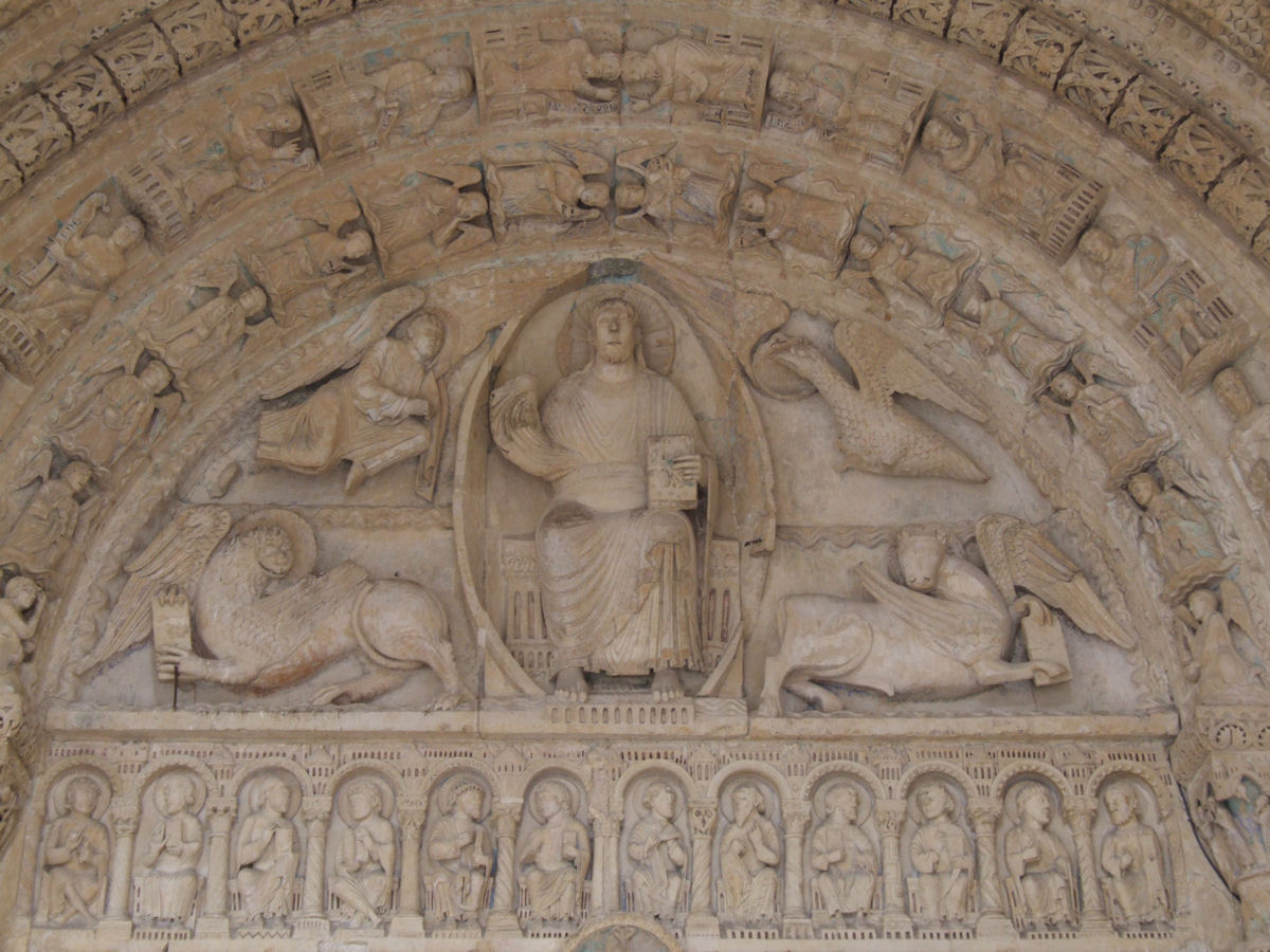 Cathédrale Saint-Étienne de Bourges, France